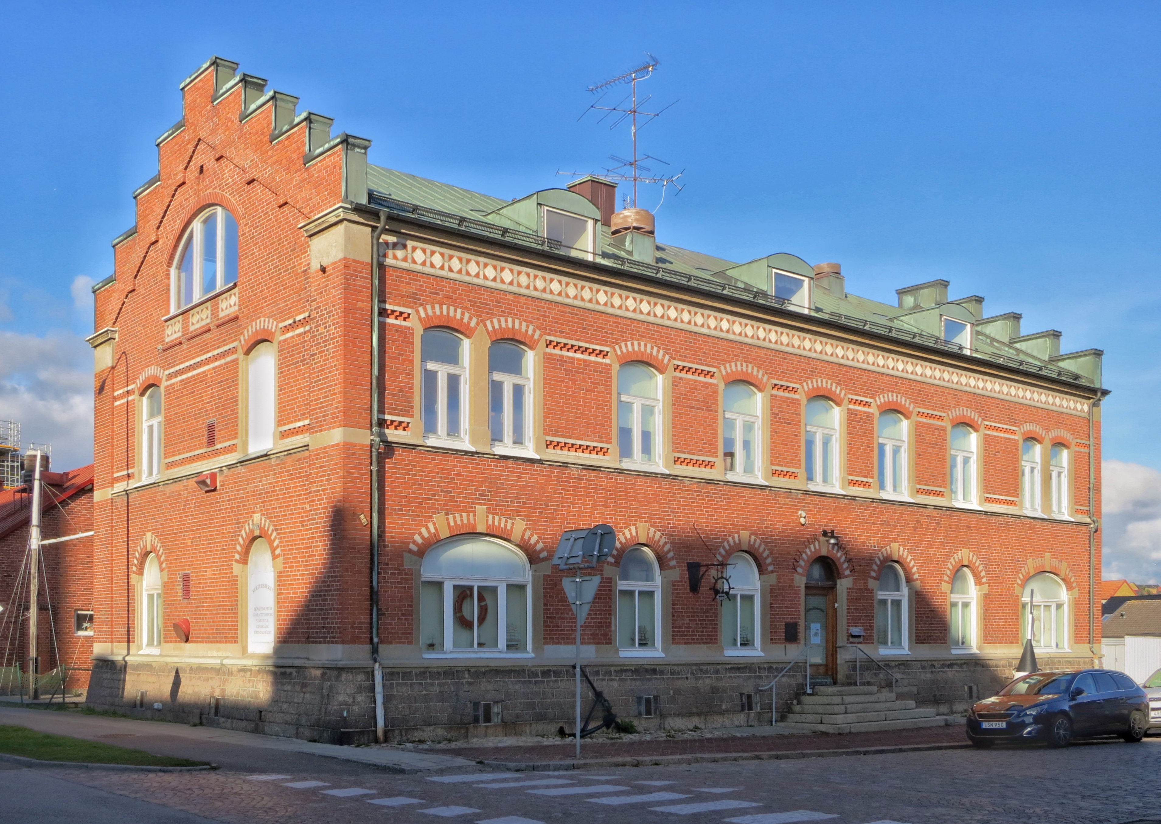 Trelleborgs Sjöfartsmuseum. Trelleborg, Trelleborg